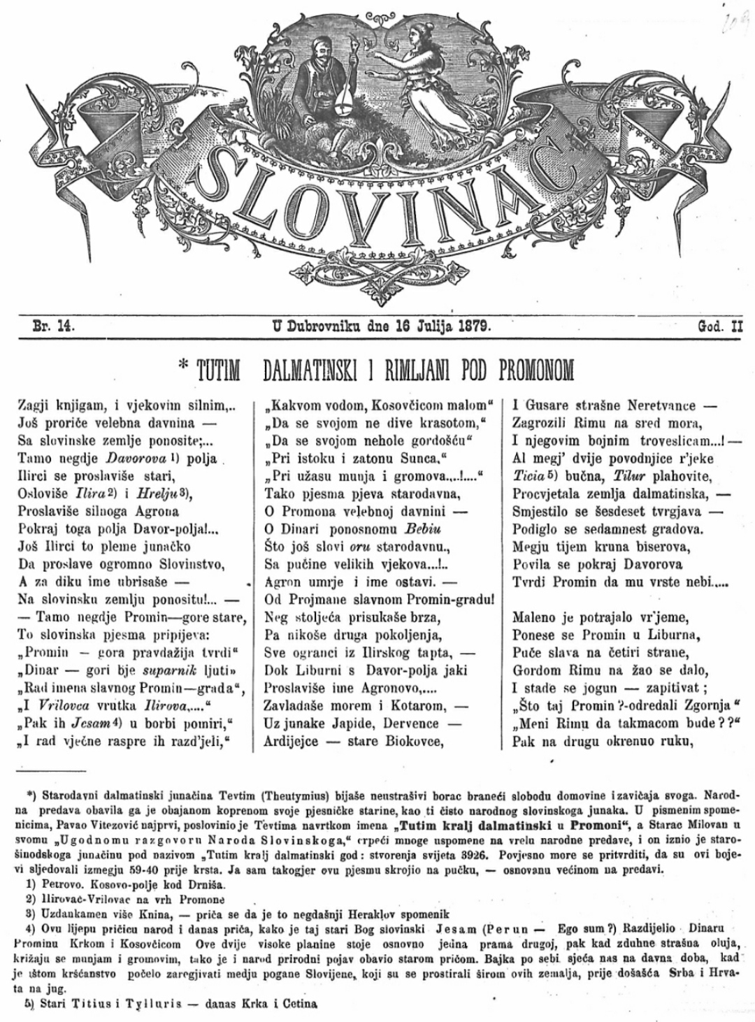 Pjesma Tutim Dalmatinski i Rimljani pod Promonom autora Grgura Bikovca u časopisu Slovinac 1879. godine